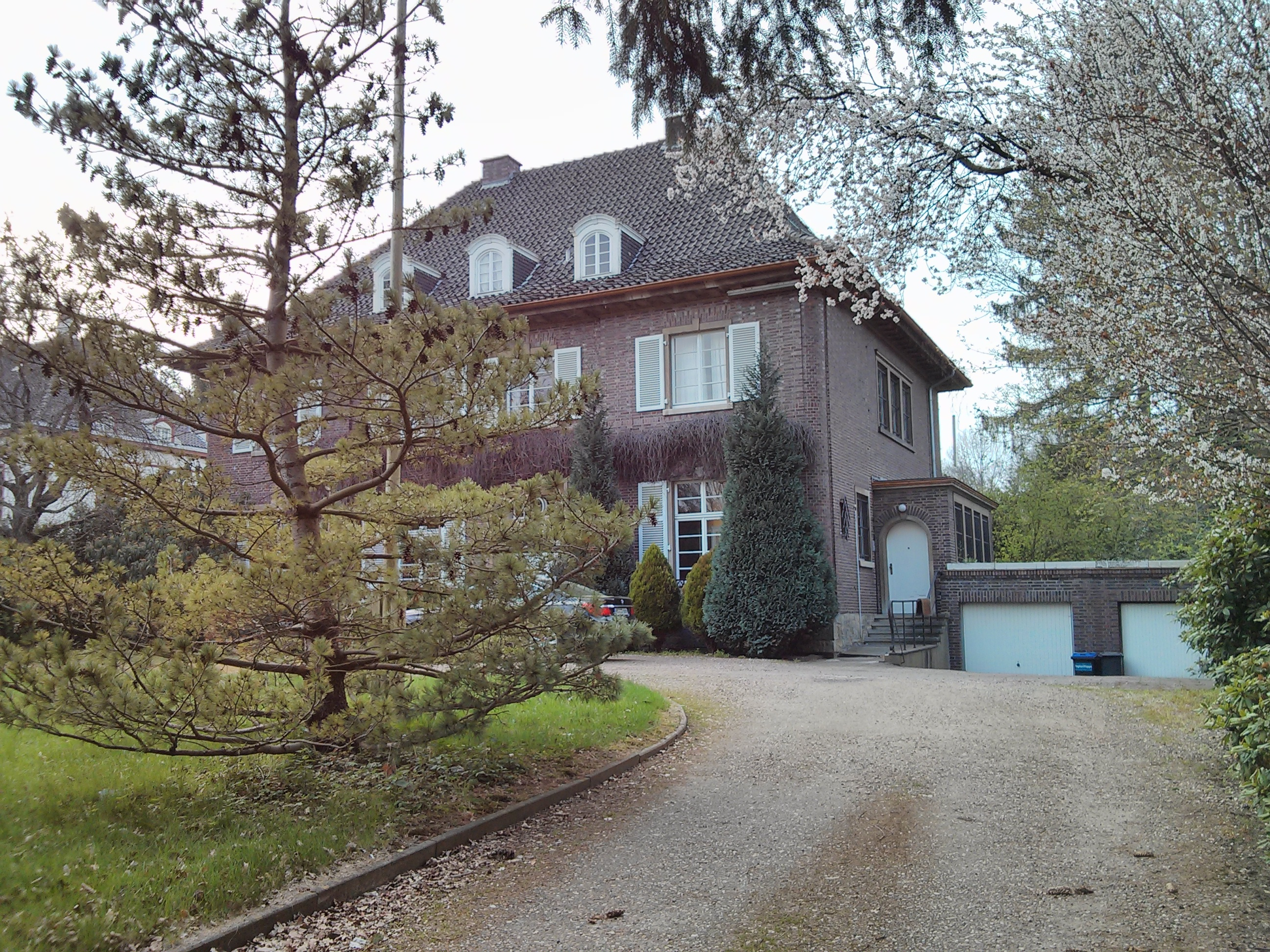 Landhaus Pappiér in Bremen, Schwachhauser Heerstraße 224, Bauherr: Kaufmann Friedrich Wilhelm Carl Pappiér, Architekt Rudolph Jacobs (1879–1946) Das abgebildete Objekt ist ein geschütztes Kulturdenkmal in der Freien Hansestadt Bremen, mit der Nr. 1128 beim Landesamt für Denkmalpflege registriert.